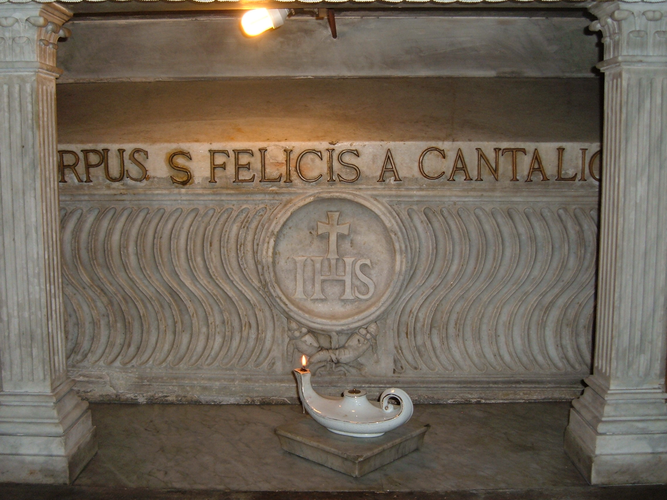 Tomba di San Felice da Cantalice, nella chiesa dei Cappuccini, a Roma, in Via Veneto.